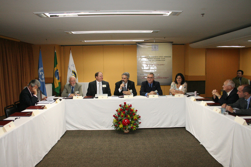 VI CLLR